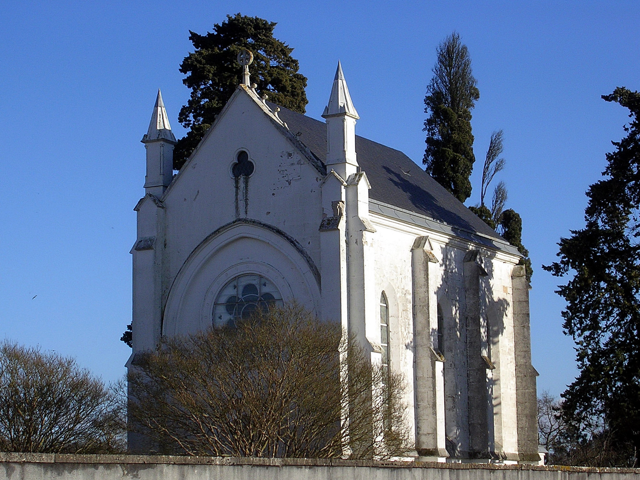 Monument funéraire du général Lamarque, à Eyre-Moncube (Landes, France)